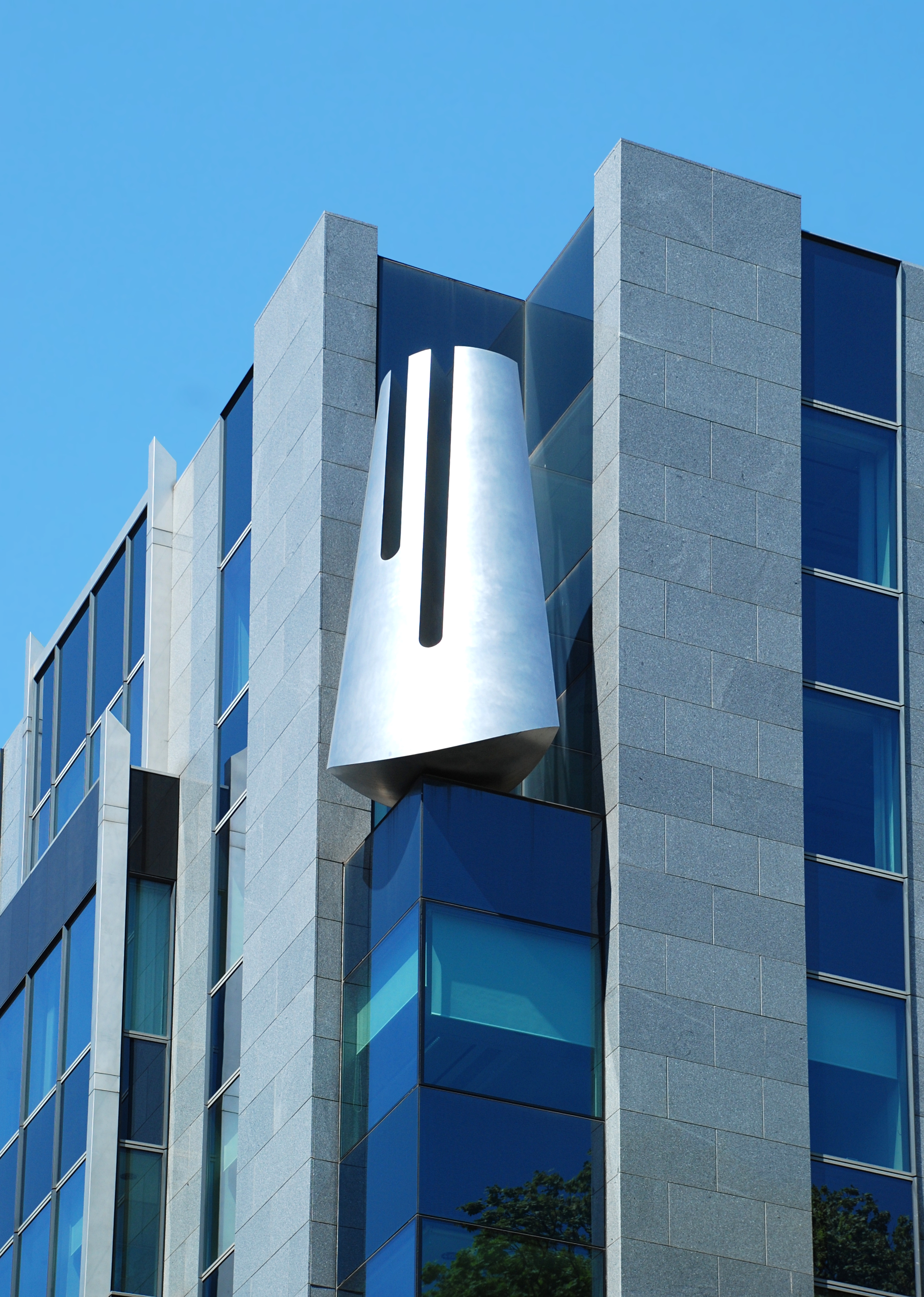 Belgique - Bruxelles - Square de Meeus - Espace Meeus (Architecture postmoderne en Belgique - Atelier d'architecture de Genval - 2004-2005)